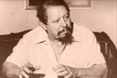 retrato